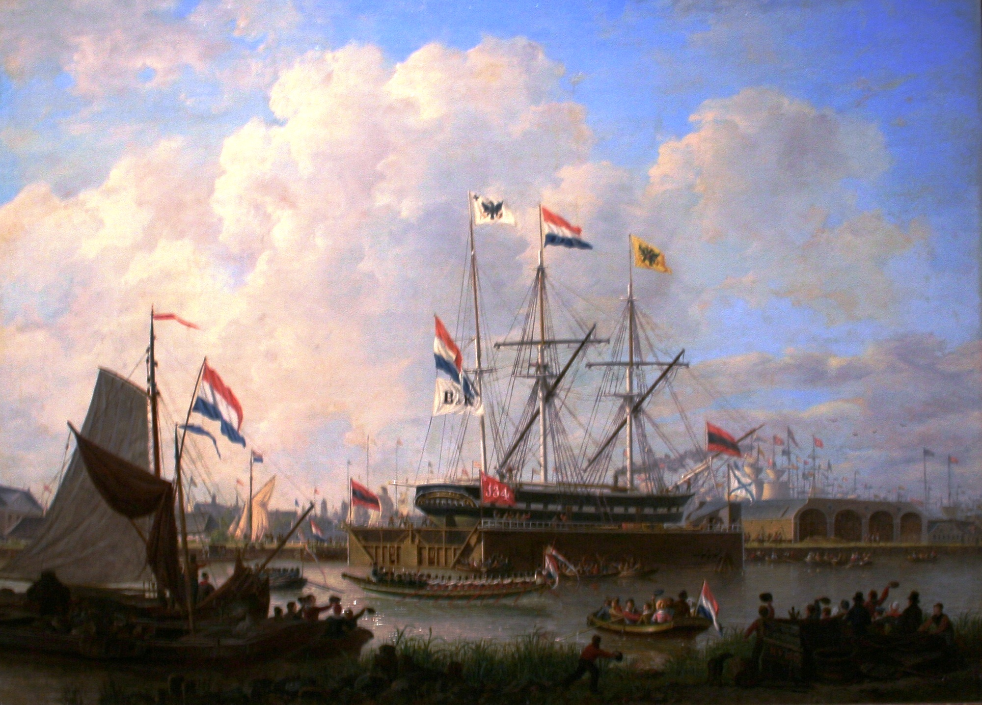 Bezoek van koning Willem II aan het eerste drijvende droogdok in 1843 in Amsterdam in het Oosterdok bij de Rijkswerf.